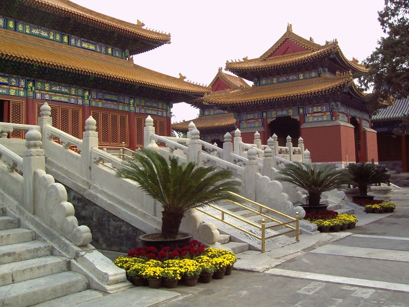 Li_Dai_Di_Wan_Miao